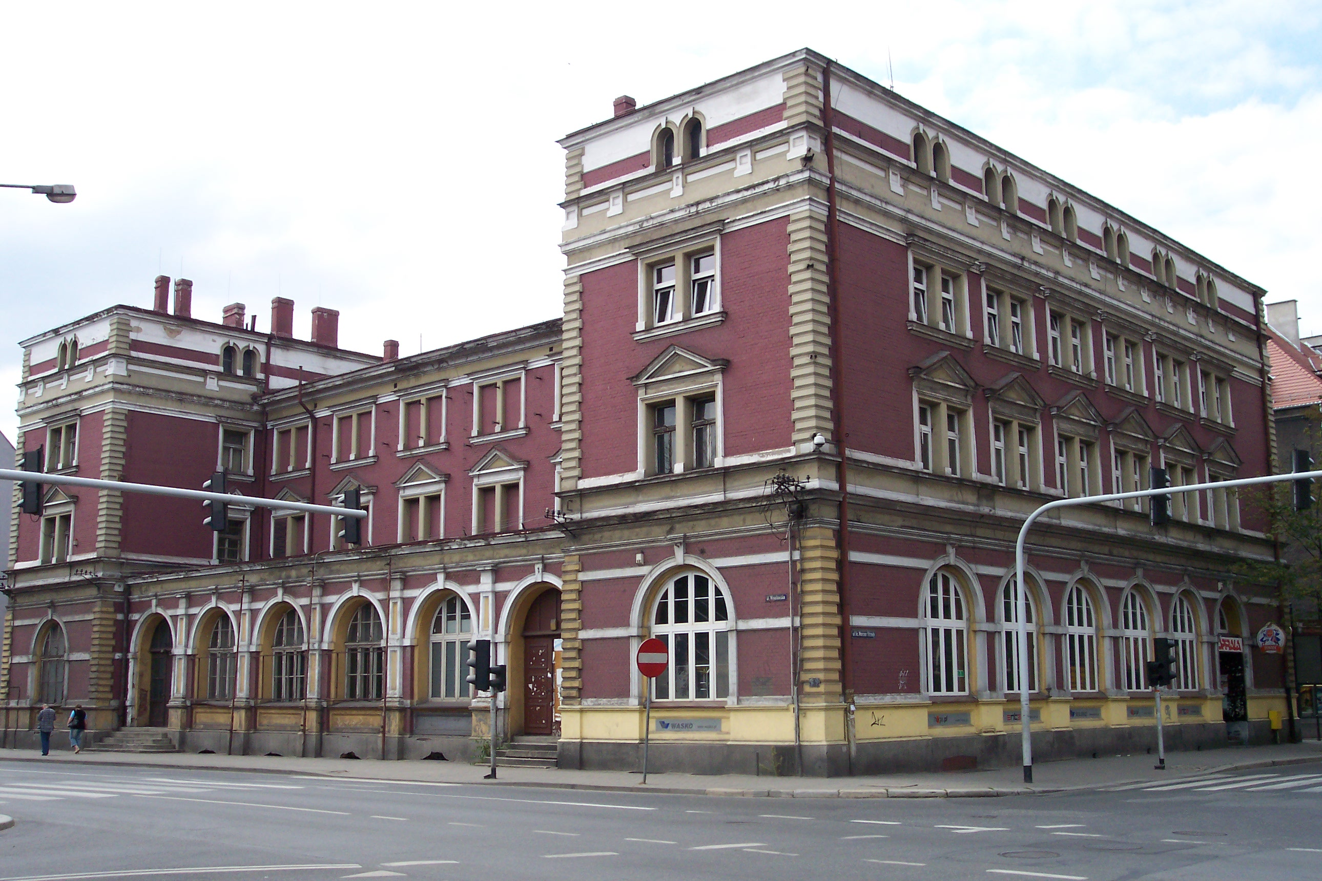 Kino-Teatr X w Gliwicach